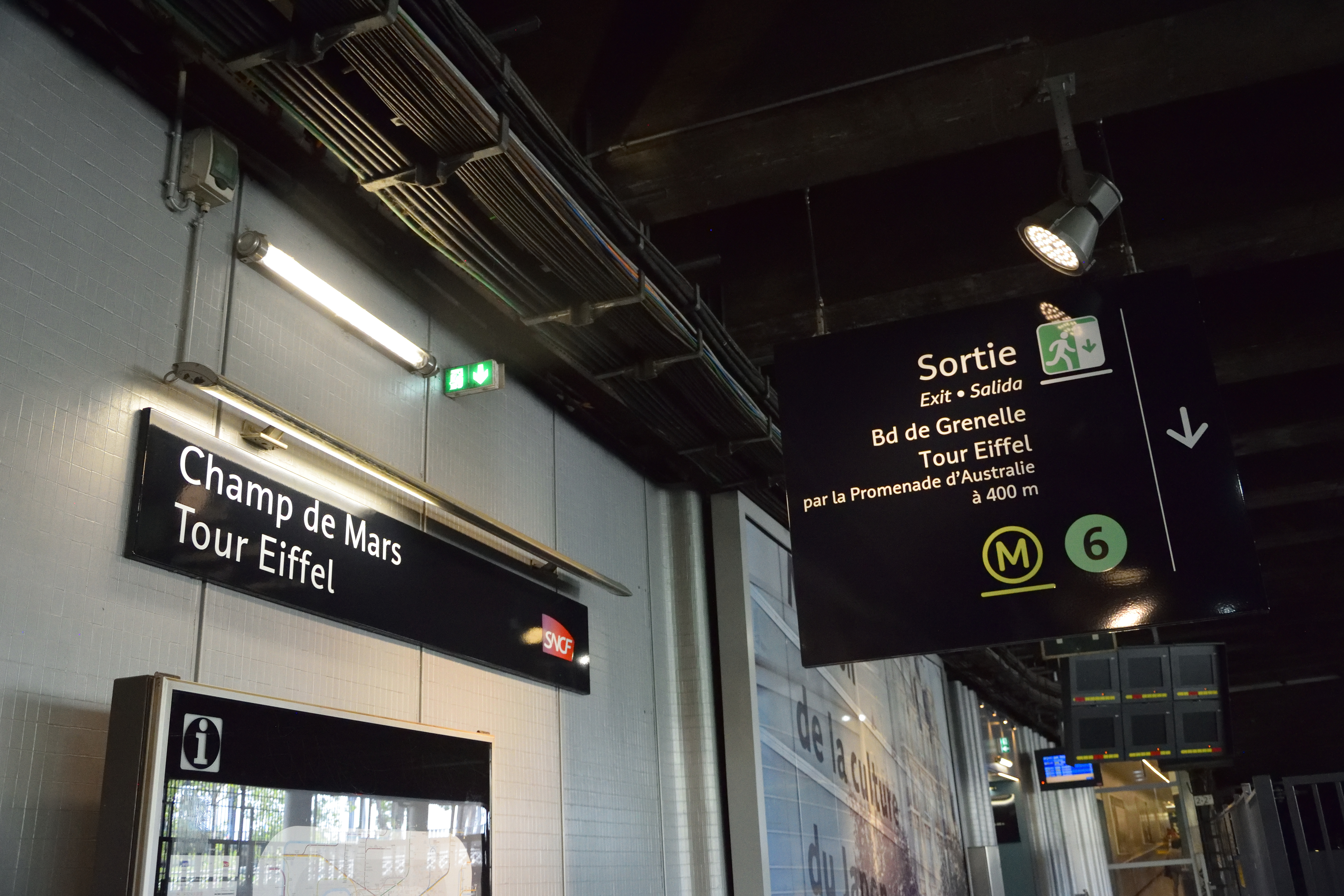 Panneaux d'informations avec indication du nom de la station et de la correspondance vers le métro de la ligne 6 à la gare du Champ de Mars - Tour Eiffel, à Paris.